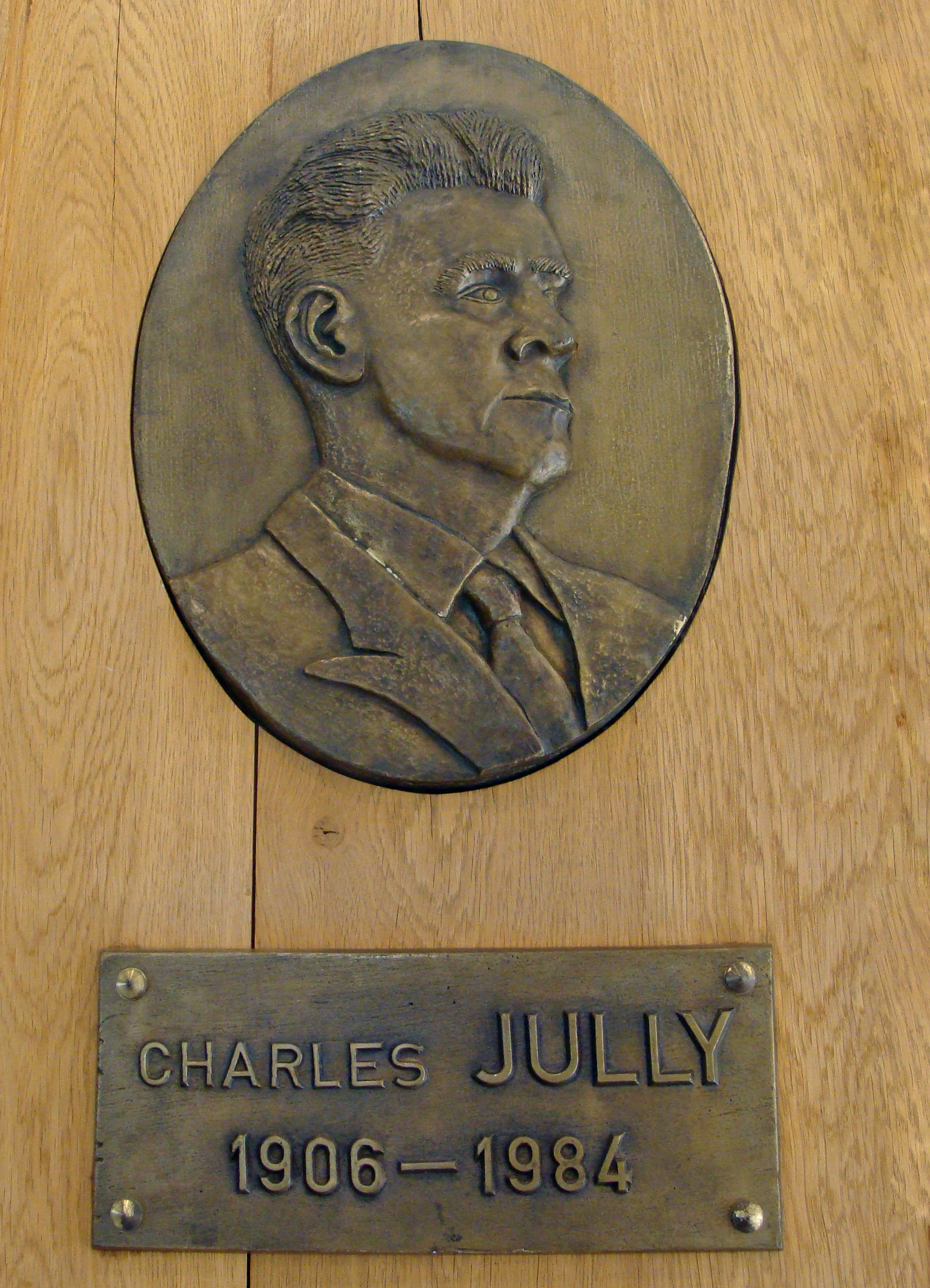 Charles July (1906-1984), ingénieur en chef, directeur de la cockerie de Carling. A l'origine du procédé qui porte son nom. Plaque commémorative située en mairie de Carling.